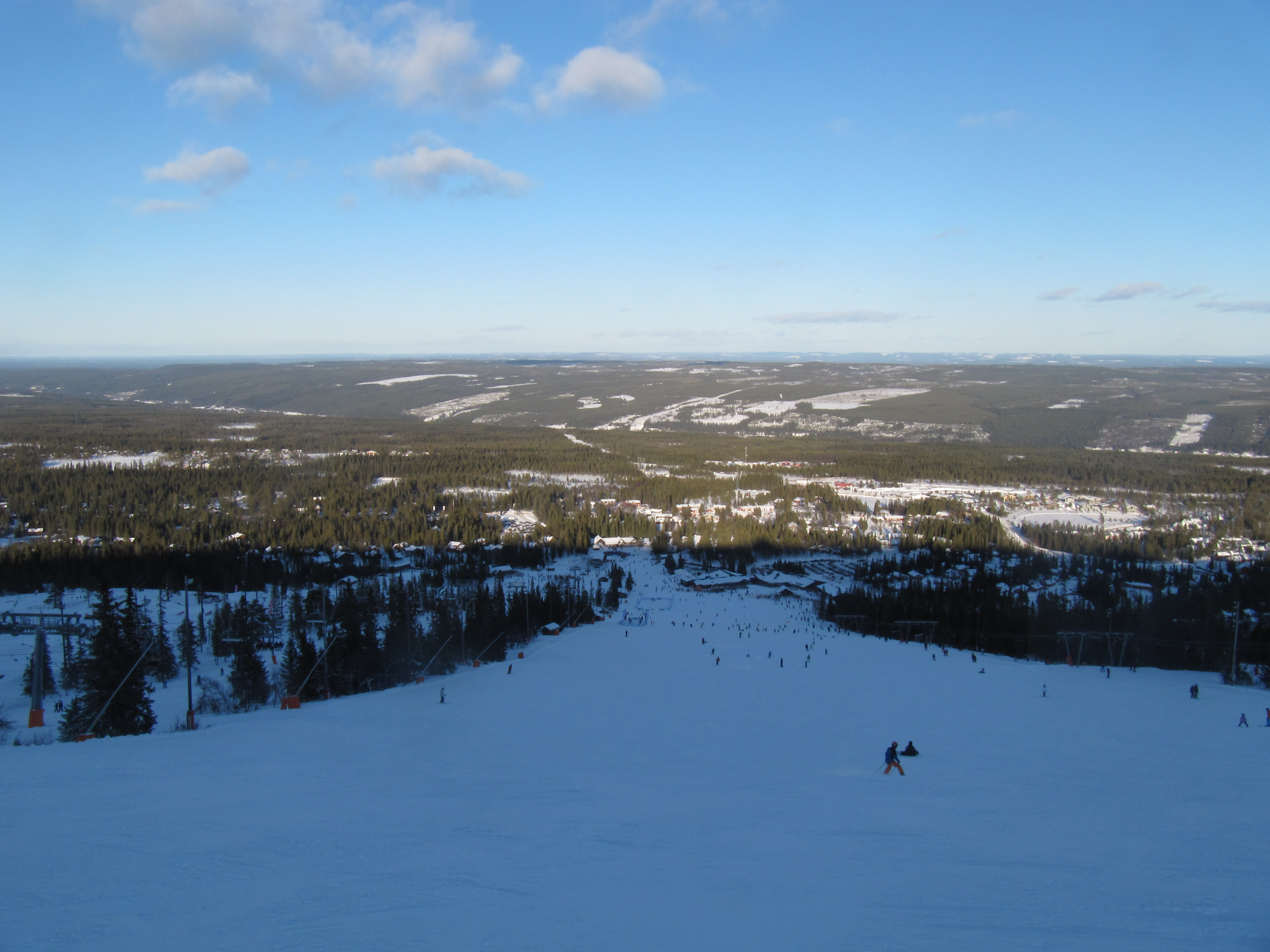 vue d'ensemble de Lindvallen, Sälen - suède